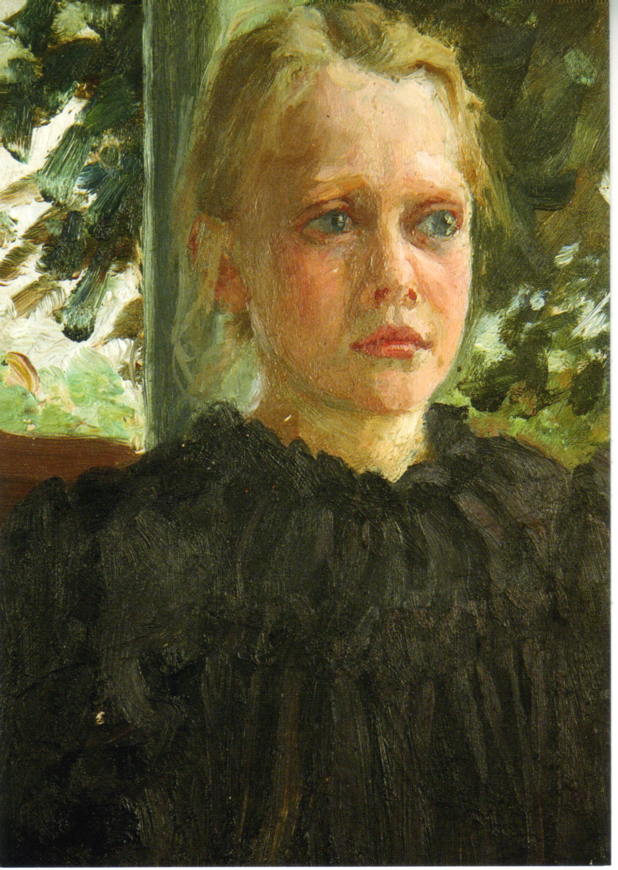 Julia Hasselberg, daughter of Swedish sculptor Per Hasselberg